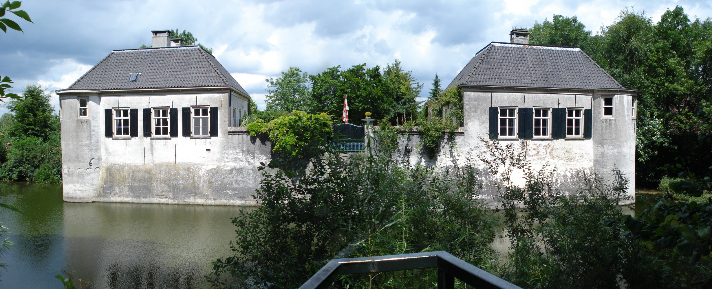 Kasteel Oijen; Oijen, le château (montage panoramique)